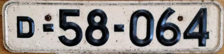 Передний дипломатический автомобильный номер СССР образца 1959 года